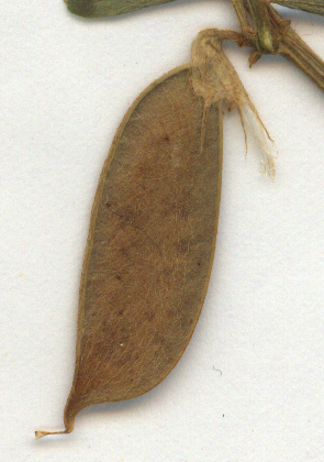 Vicia pannonica, eigener Herbarbeleg, Schote